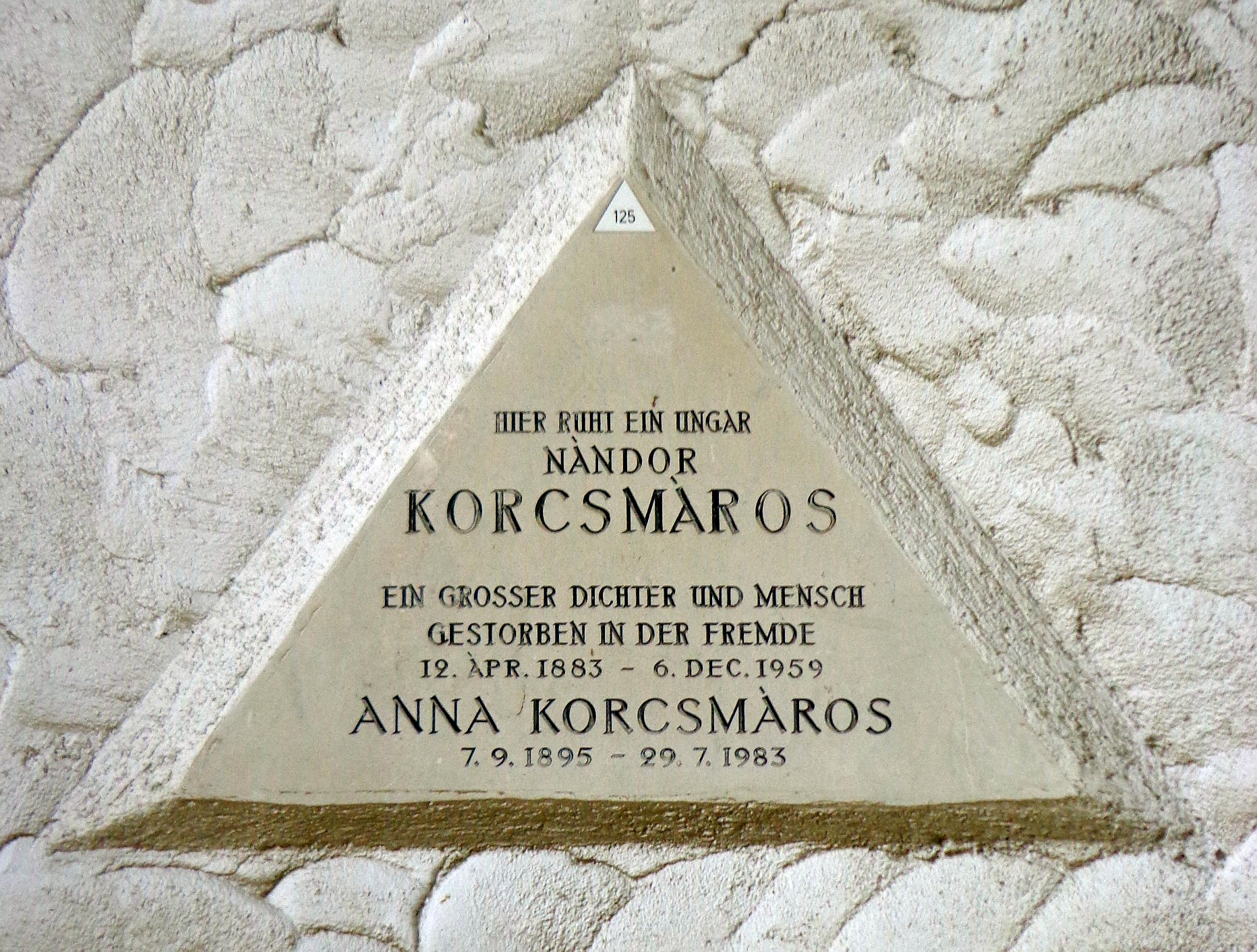 Feuerhalle Simmering - Arkadenhof (Abteilung ARI) - Nàndor Korcsmàros